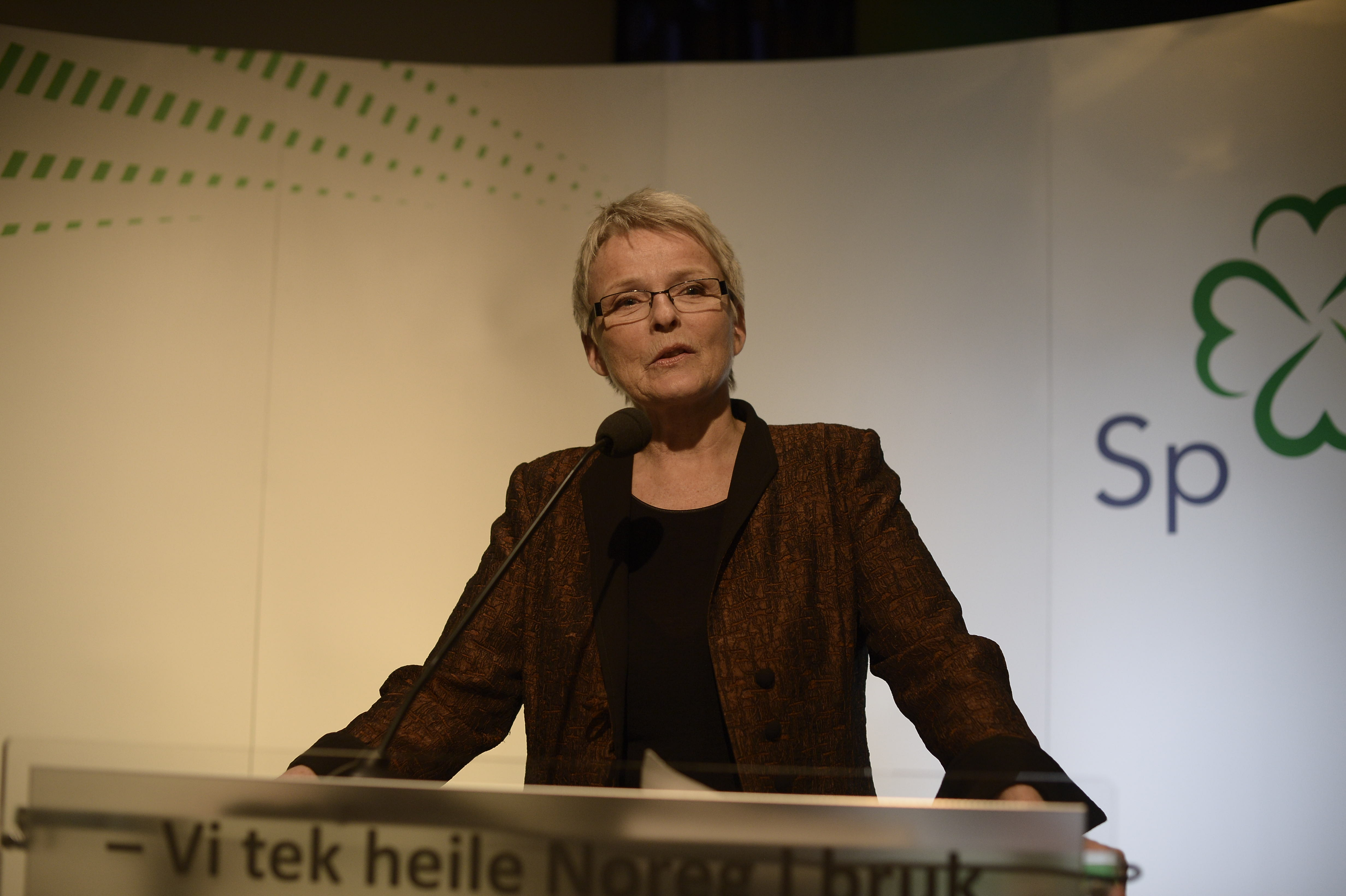 Anne Enger på Senterpartiets landmøte 2013